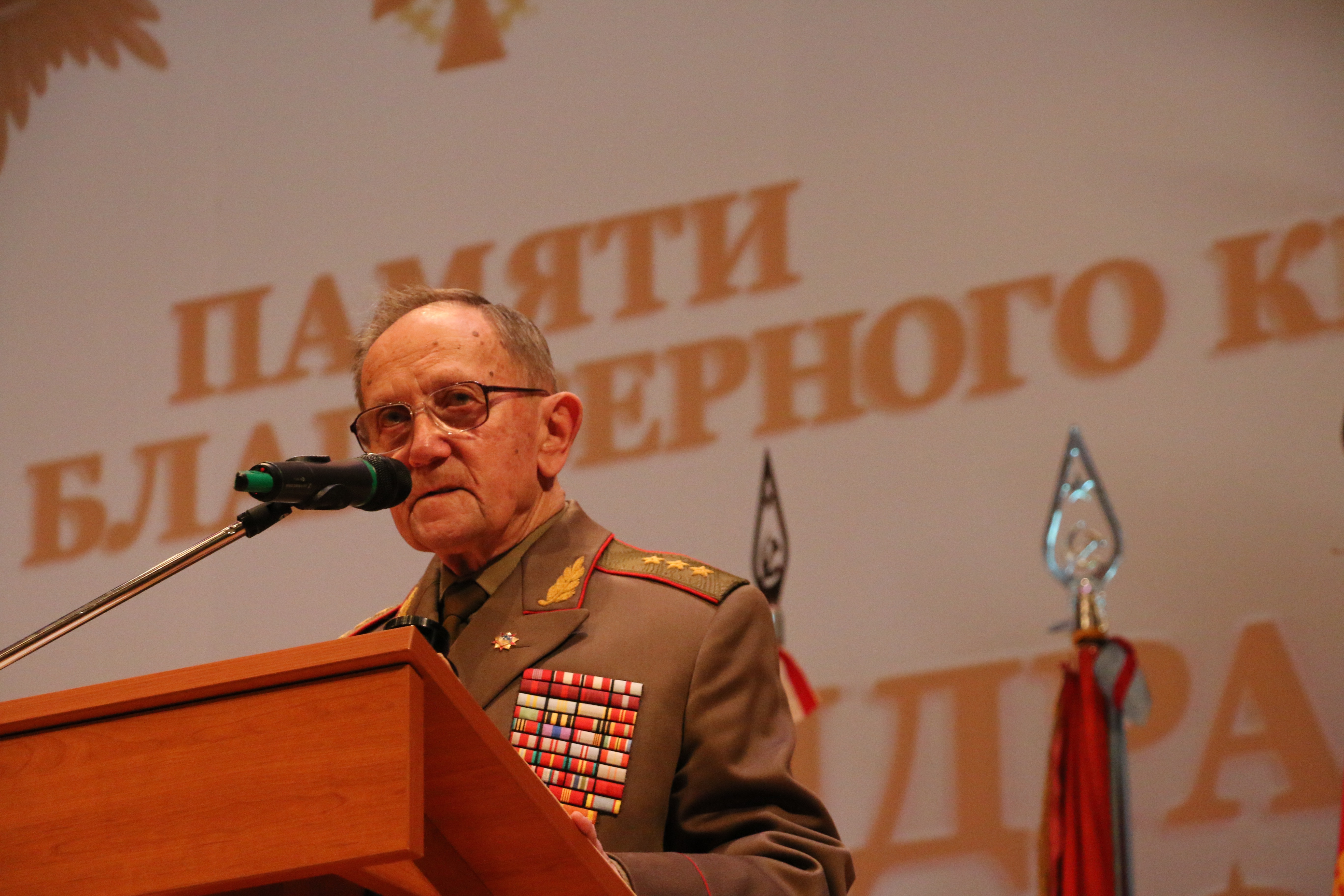 декабрь 2016 г.